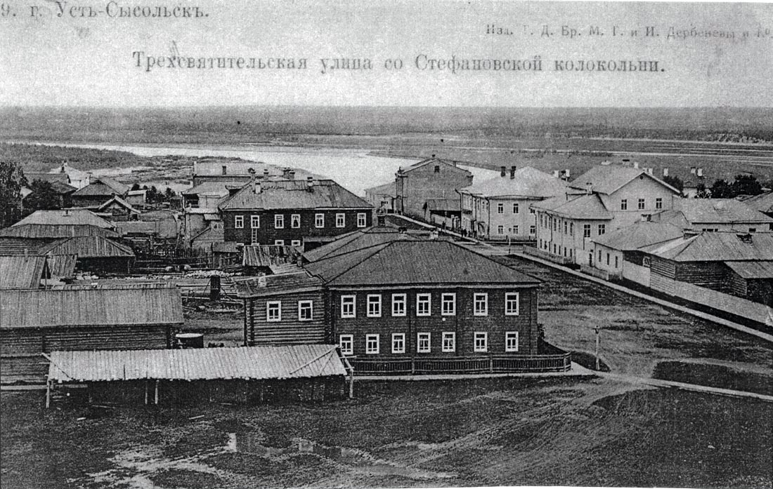 Усть-Сысольск в начале XX века - Трехсвятительская улица (с ноября 1918 - Коммунистическая) со Стефановской колокольни